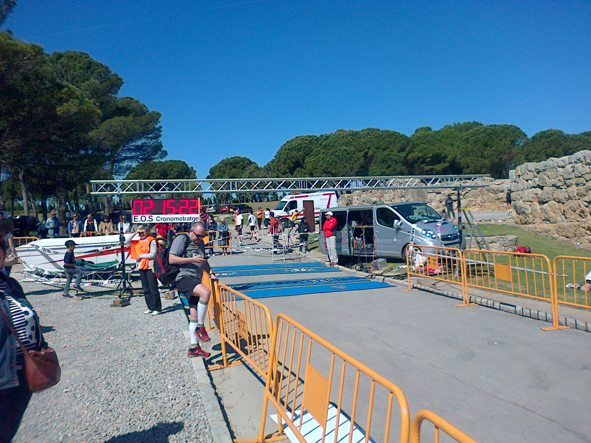 Arribada de la Marátó d'Empúries, al Museu Arqueológic de Catalunya-Empúries